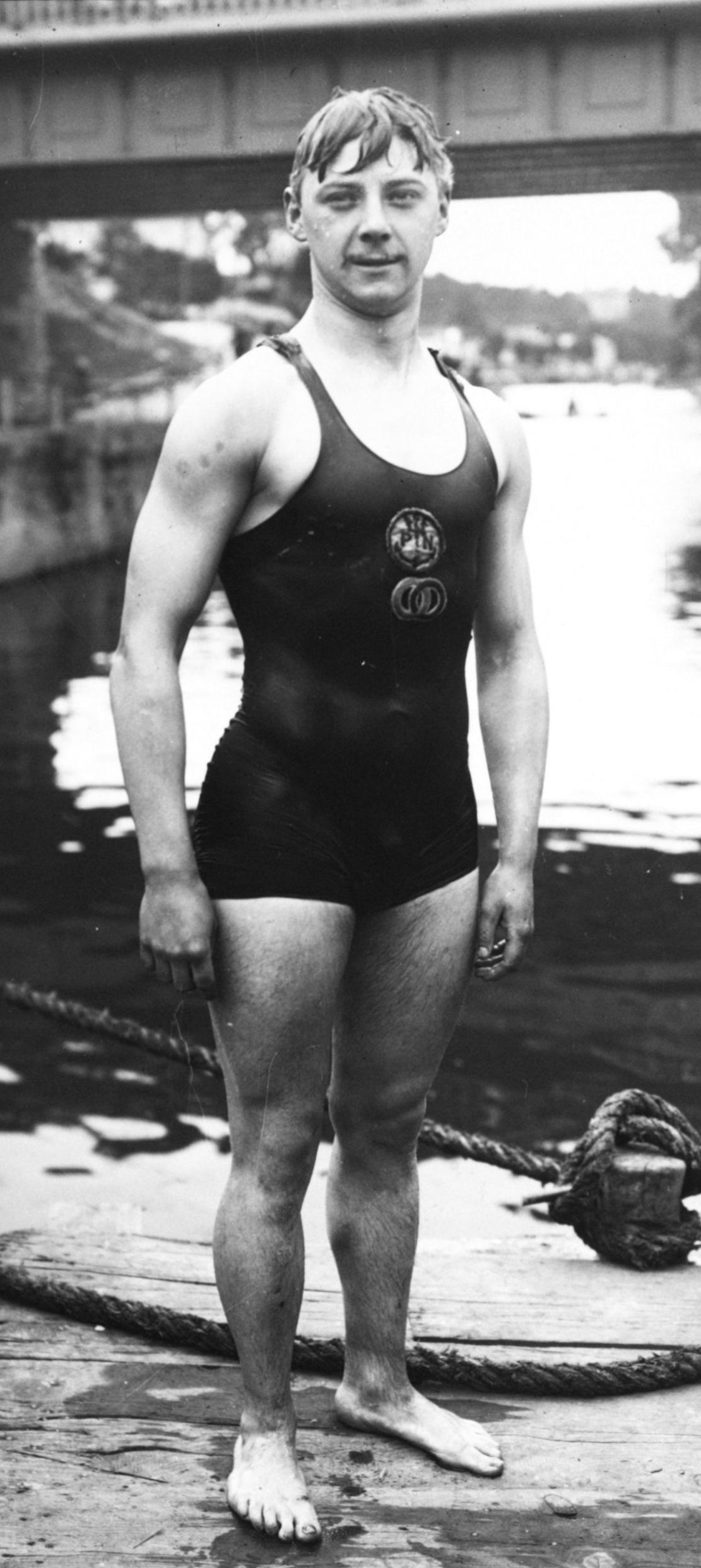 15-8-12, Joinville-le-Pont, Caby, 1er du 500 mètres [portrait du nageur] : [photographie de presse] / [Agence Rol]